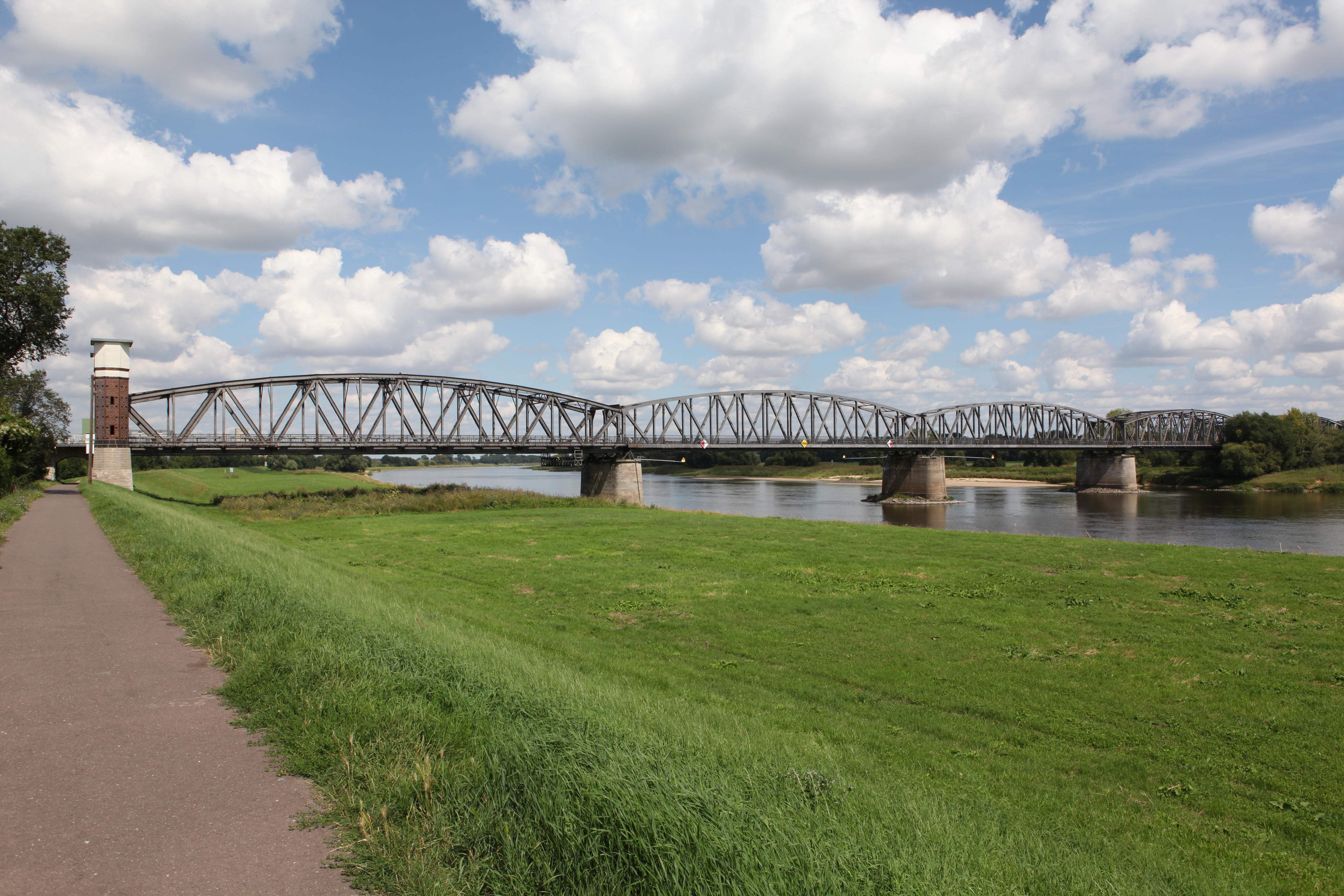 Elbebrücke Barby